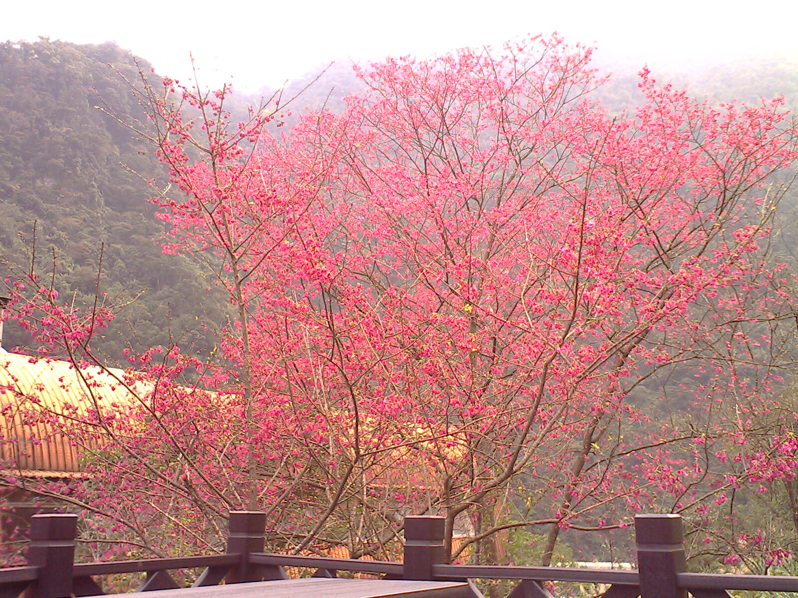 描述摘要 烏來櫻花 來源 User:阿貴 日期 2007/2/12 作者 User:阿貴 許可 本檔案其他版本